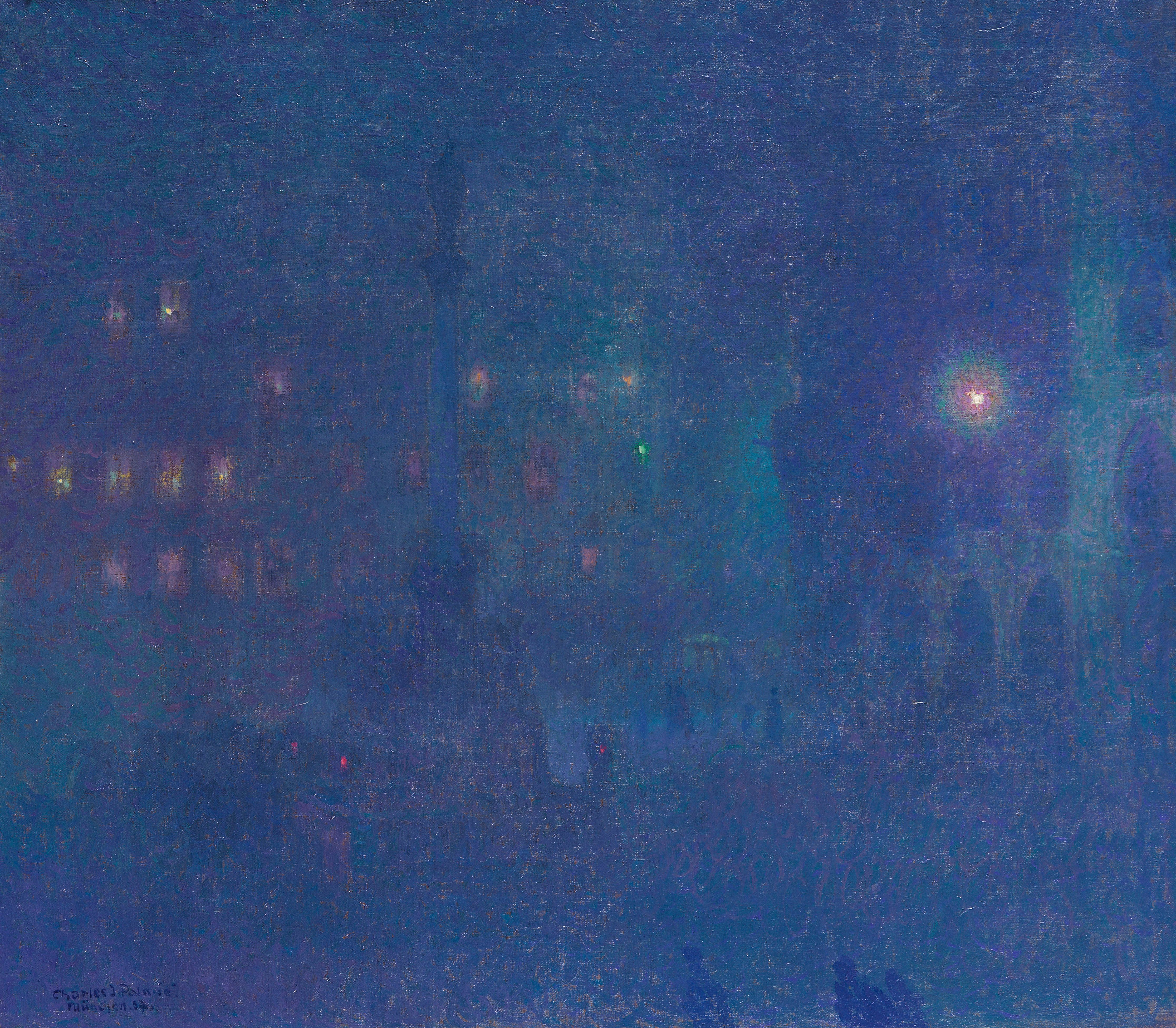 Johann Charles Palmié: Der Marienplatz in München bei Nacht. Öl auf Leinwand, 73 x 83 cm, links unten signiert, datiert und bezeichnet "München"